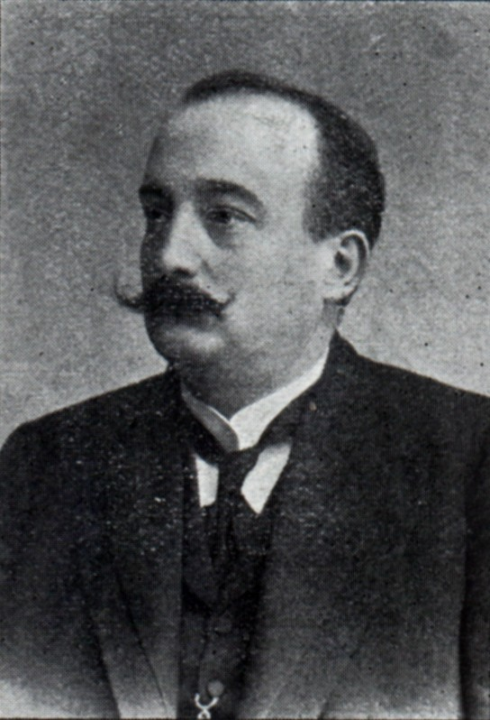 Emanuel Formánek (1869-1929), Český lékař a chemik.